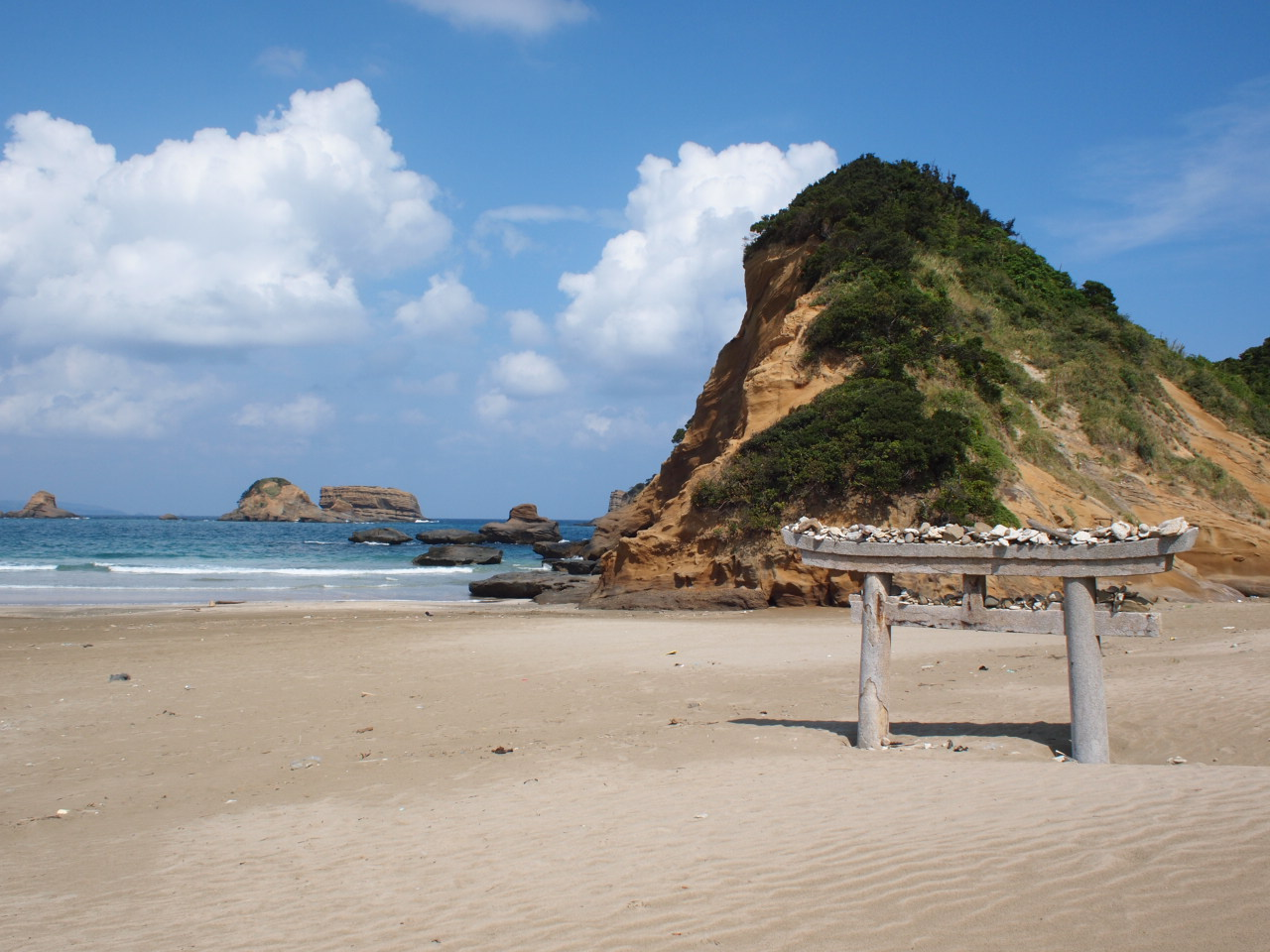 種子島南種子町東岸にある岩窟の外観